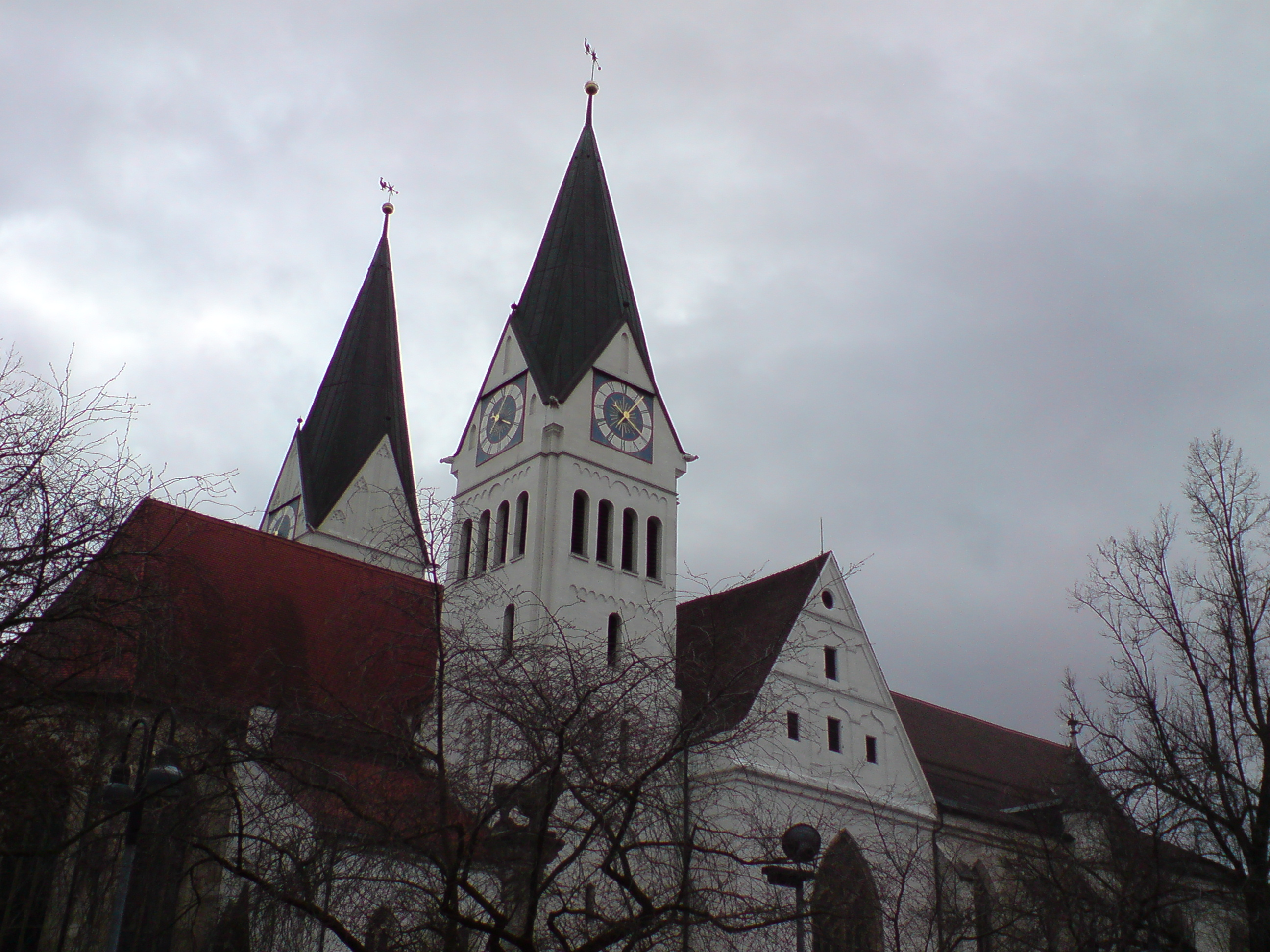 Eichstätter Dom